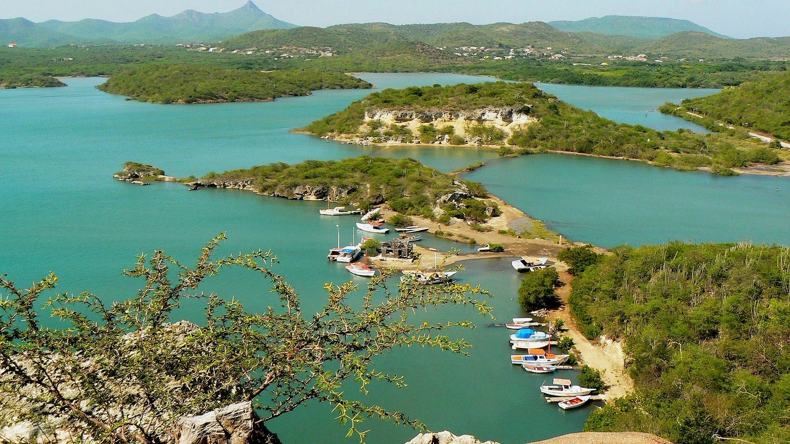 Curaçao 2011